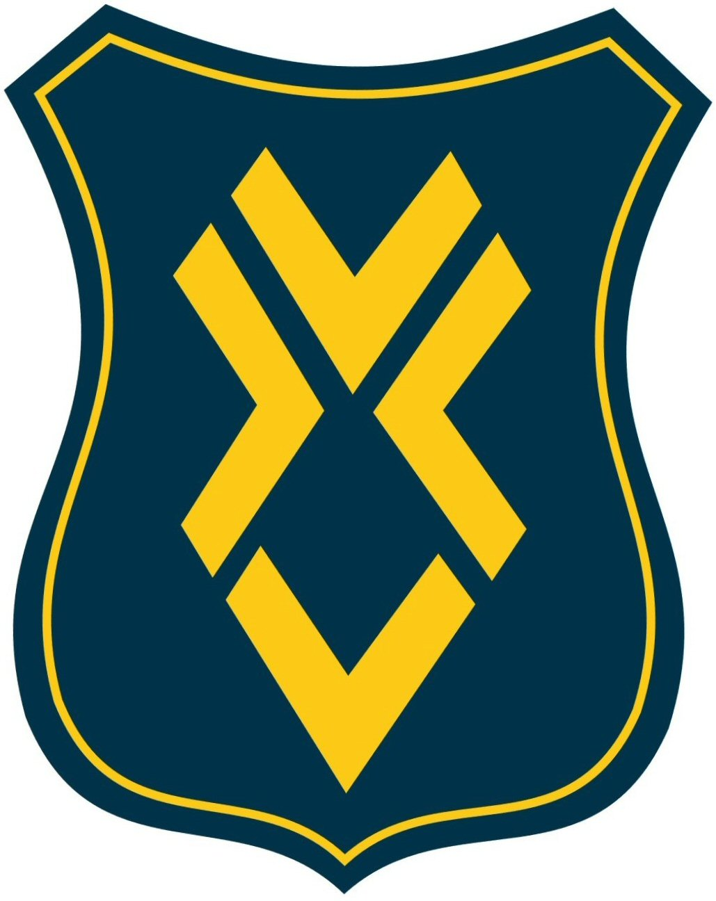 Logo de Universidad José Cecilio del Valle